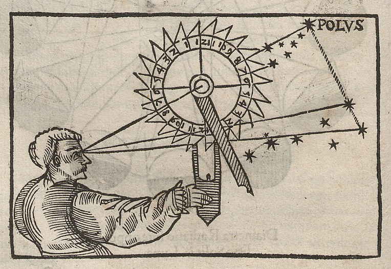 Original image description from the Deutsche FotothekKosmografie & Nacht & Instrument & Zeit